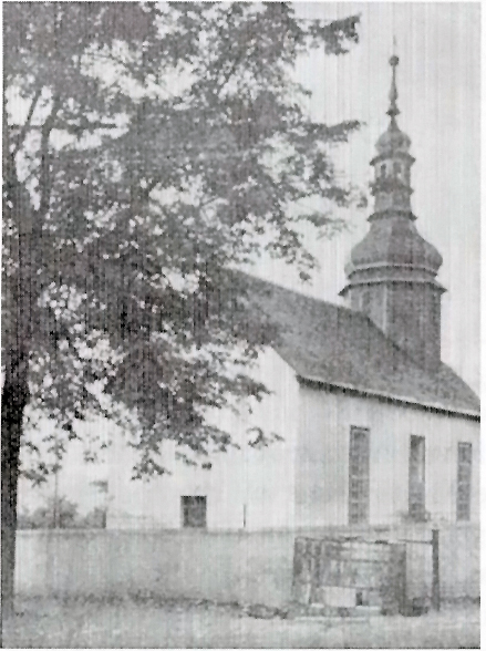 Kirche Kleinkamsdorf um 1900 (mit altem Kirchturm)